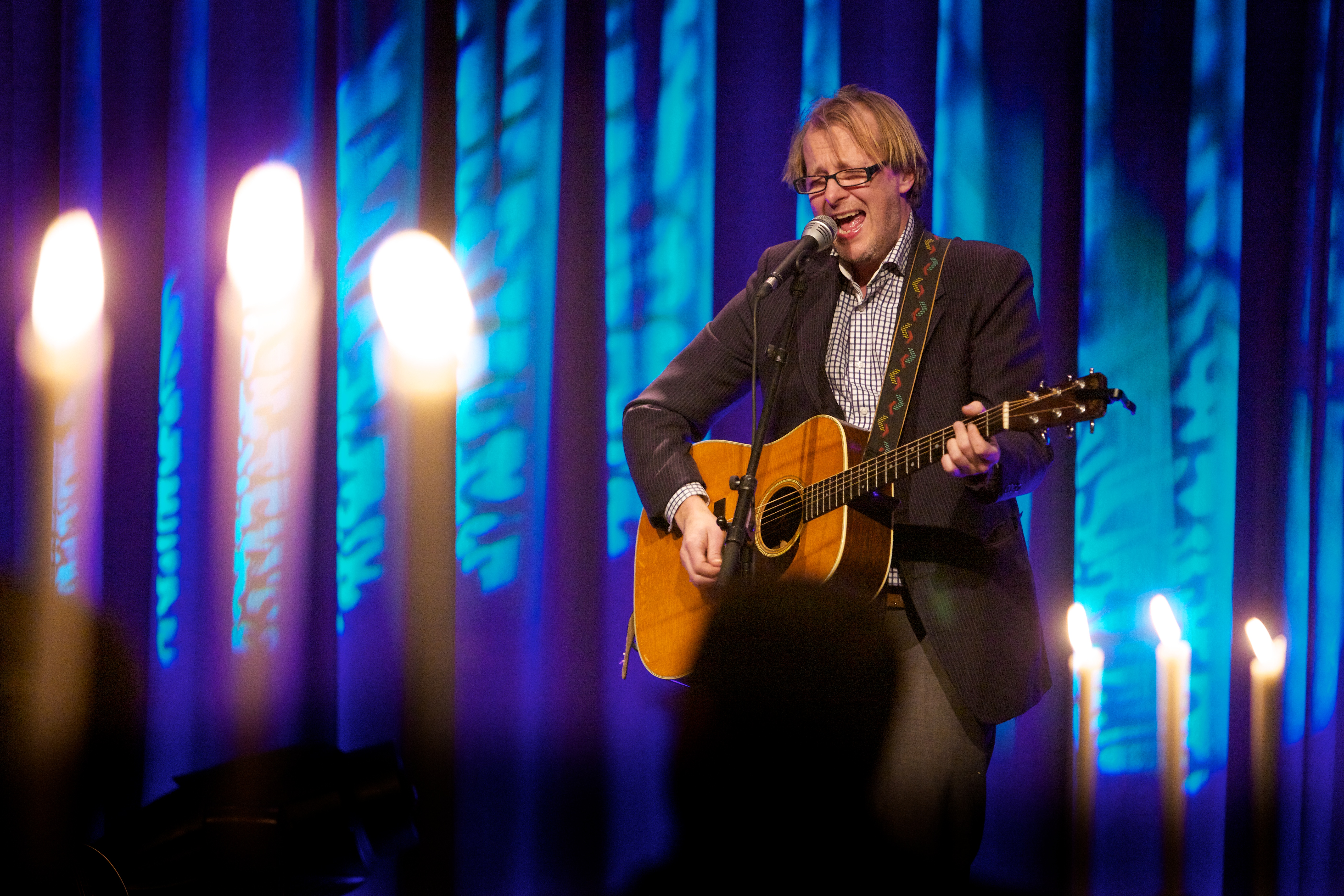 Lars Lillo-Stenberg. ZERO-konferansen arrangeres av den norske miljøstiftelsen Zero Emission Resource Organization (ZERO). Foto: Eirik Helland Urke